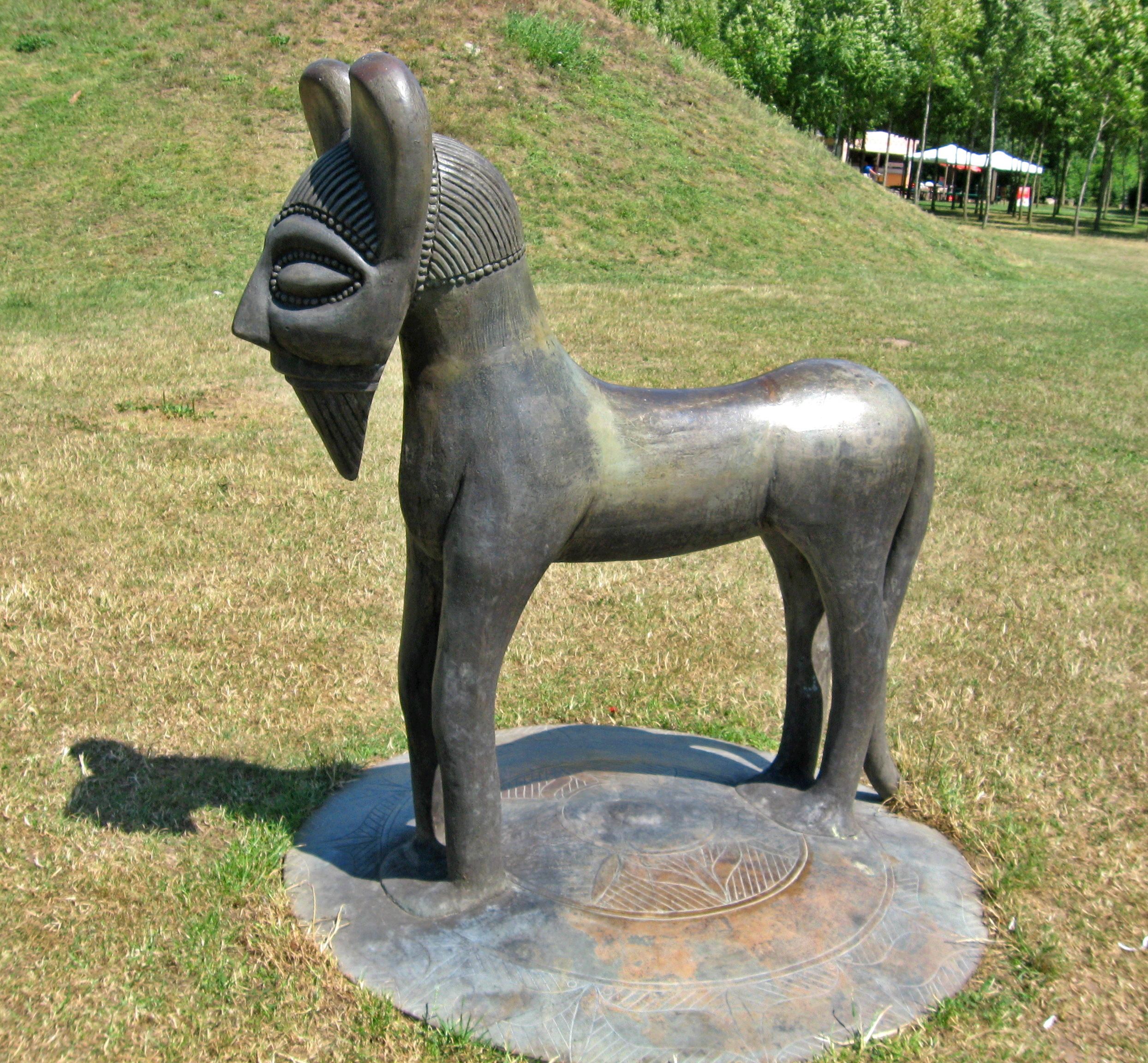 Bronzefigur